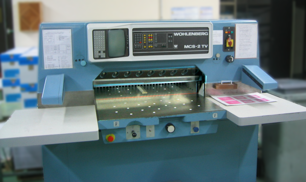 photo libre de droit